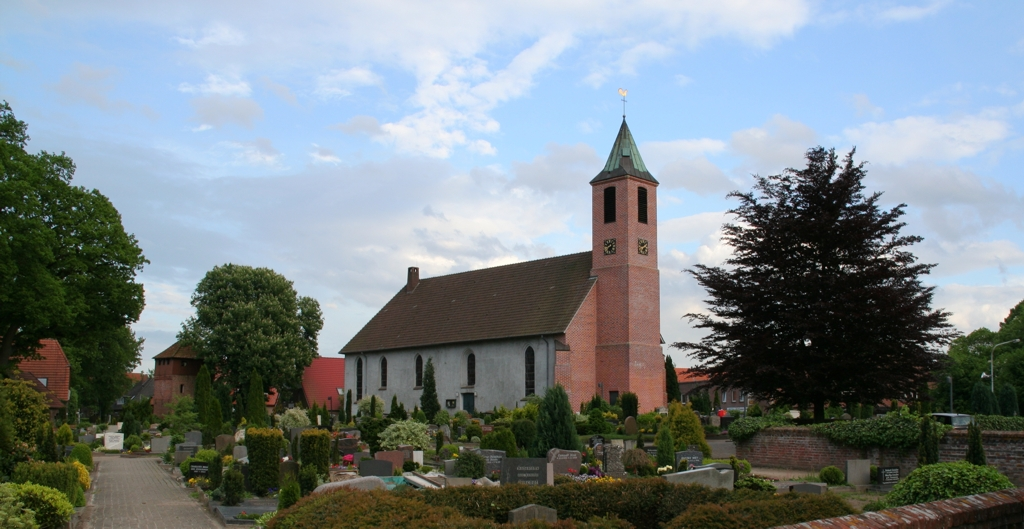 Marienkirche, Church of Wardenburg, Niedersachsen, Germany